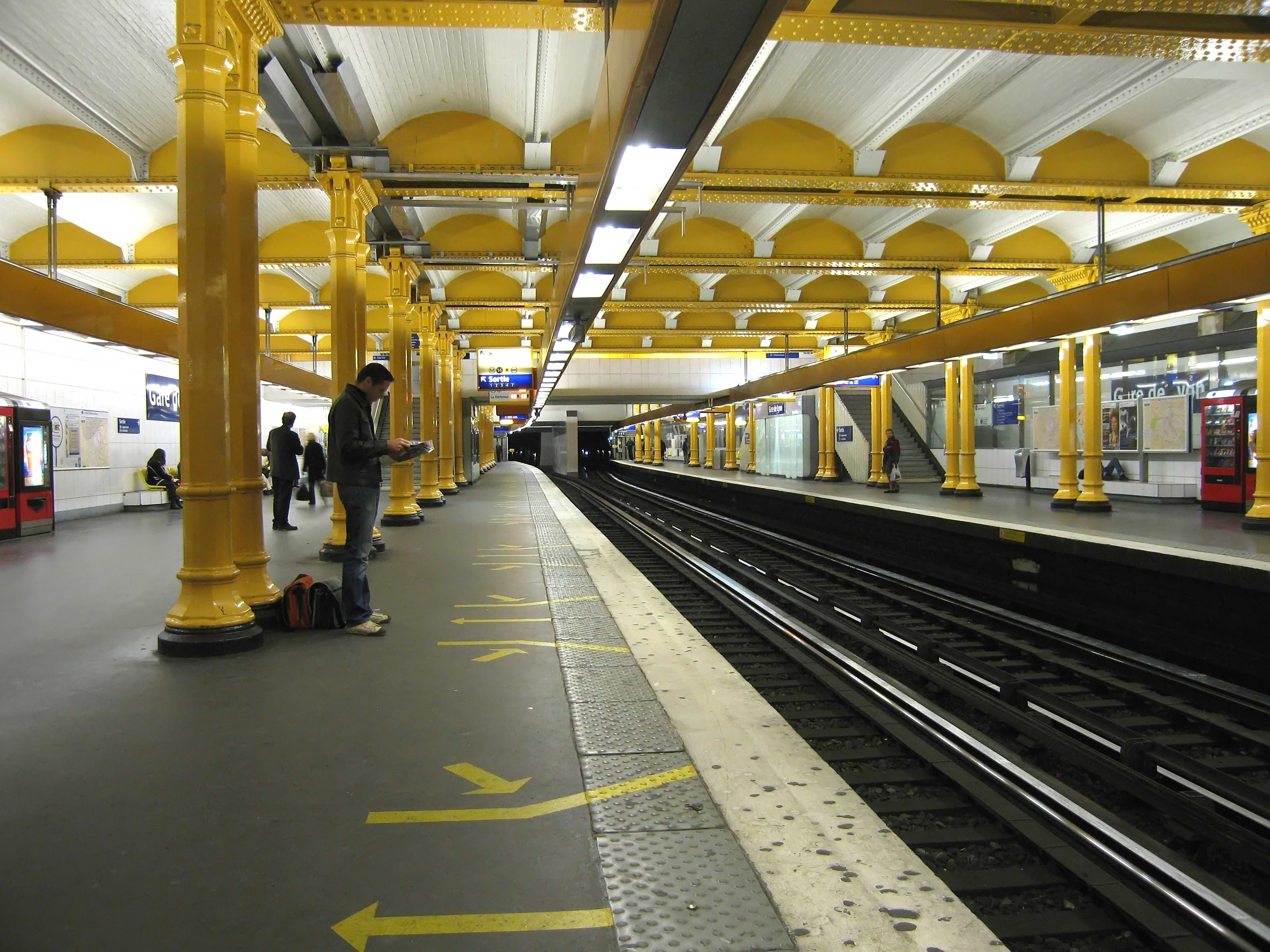 Métro de Paris, Station Gare de Lyon (ligne 1), Paris, France